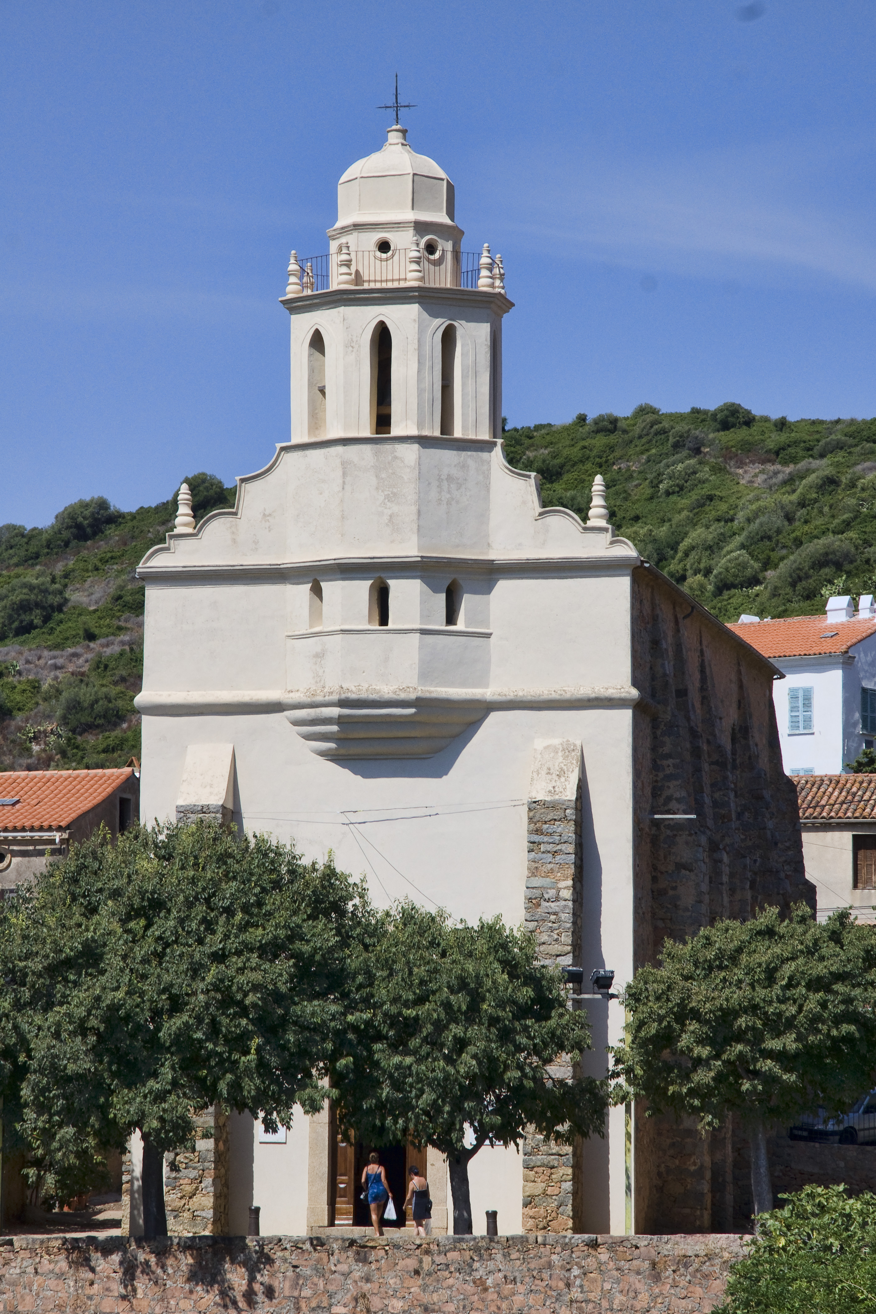 Corse, Cargèse, Eglise Grecque